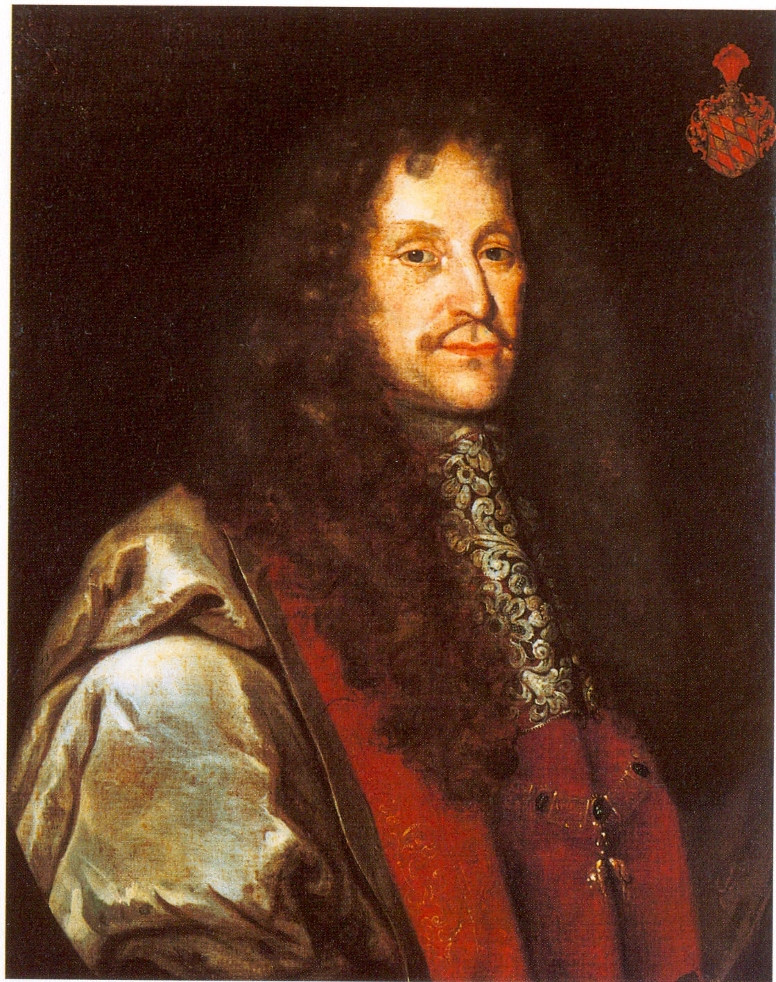 Leopold Wilhelm Graf von Königsegg-Rothenfels (1630 – 1694) Vizepräsident des Reichshofrats 1665 – 1671 Reichsvizekanzler 1666 – 1694